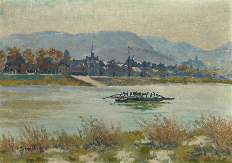 Rheinfähre.